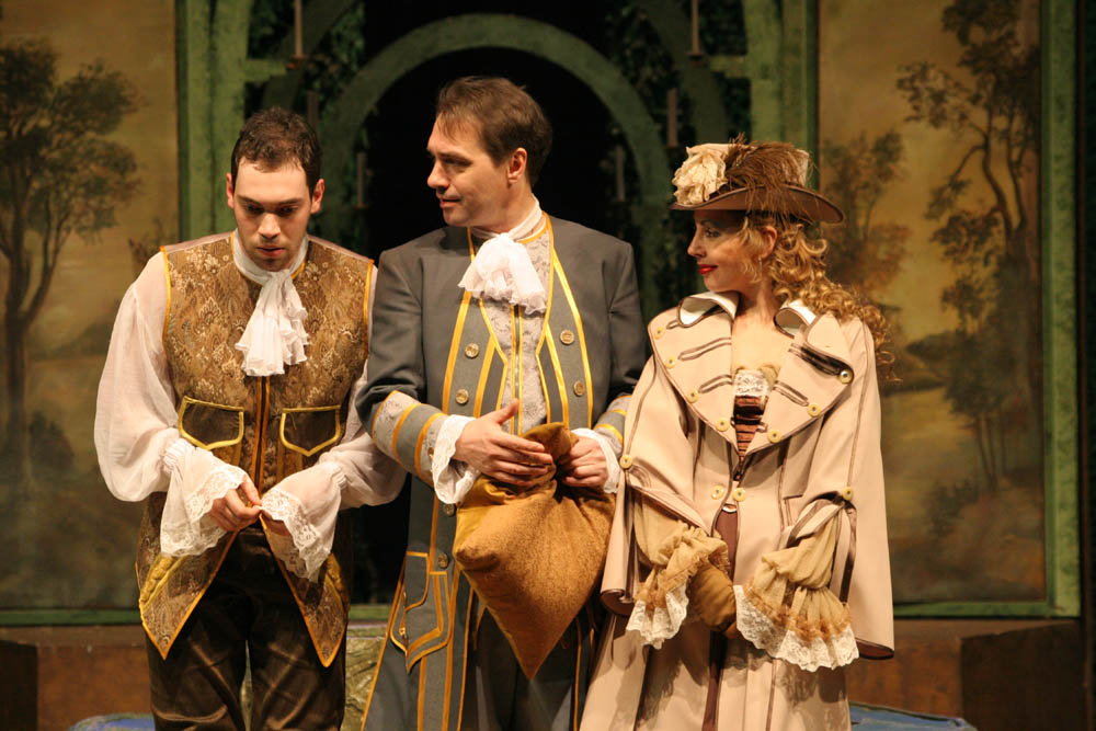 Сцена из спектакля Саратовского академического театра драмы «Ночь ошибок». Актёры Григорий Алексеев, Игорь Баголей и Ольга Милованова